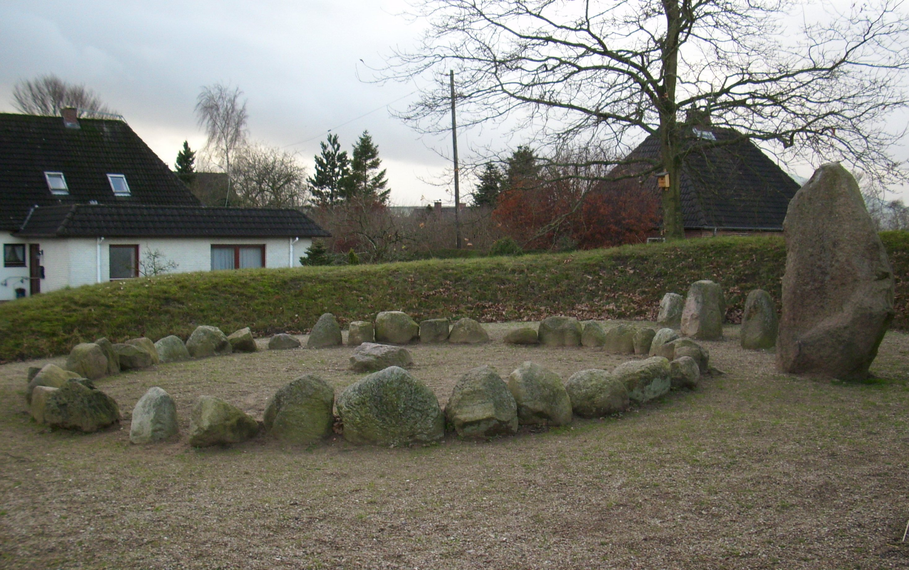 Grabhügel Kummerhy in Süderbrarup, Gravhøj Kummerhy i Sønder Brarup